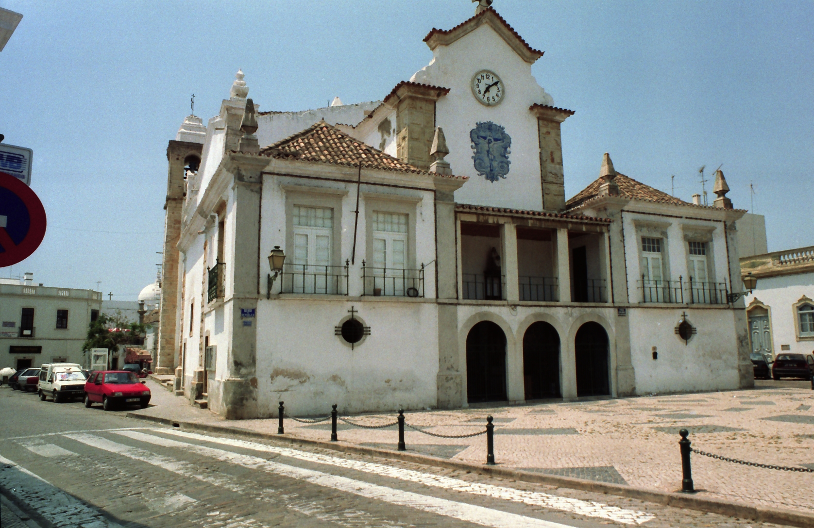 Portugal - Algarve: Olhão: Hinterseite der Pfarrkirche Nossa Senhora do Rosário